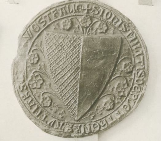 Siegel des Marschalls von Westfalen Johann von Plettenberg